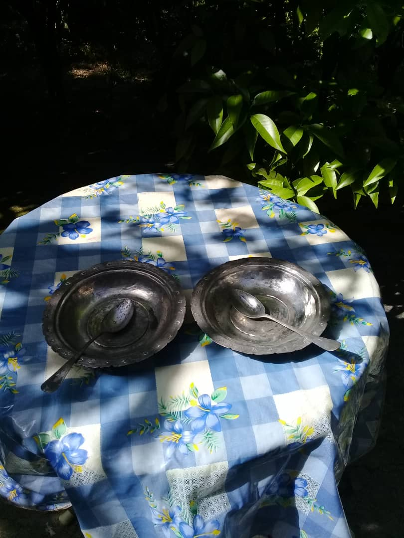 صحون نحاسية قديمة من تراث قرية الجديدة - قرية الجديدة - اللاذقية - سوريا